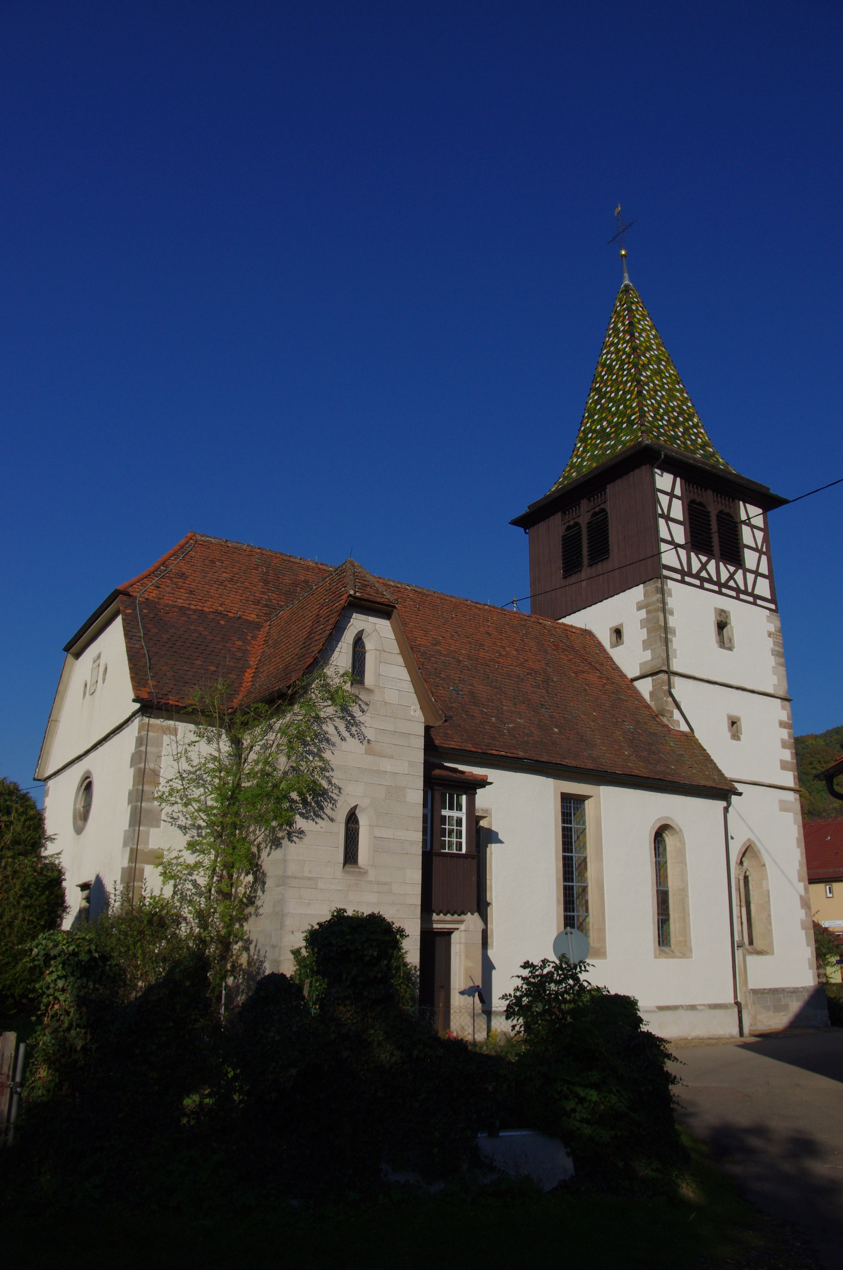 Evangelische Kirche, Schorndorf-Schornbach